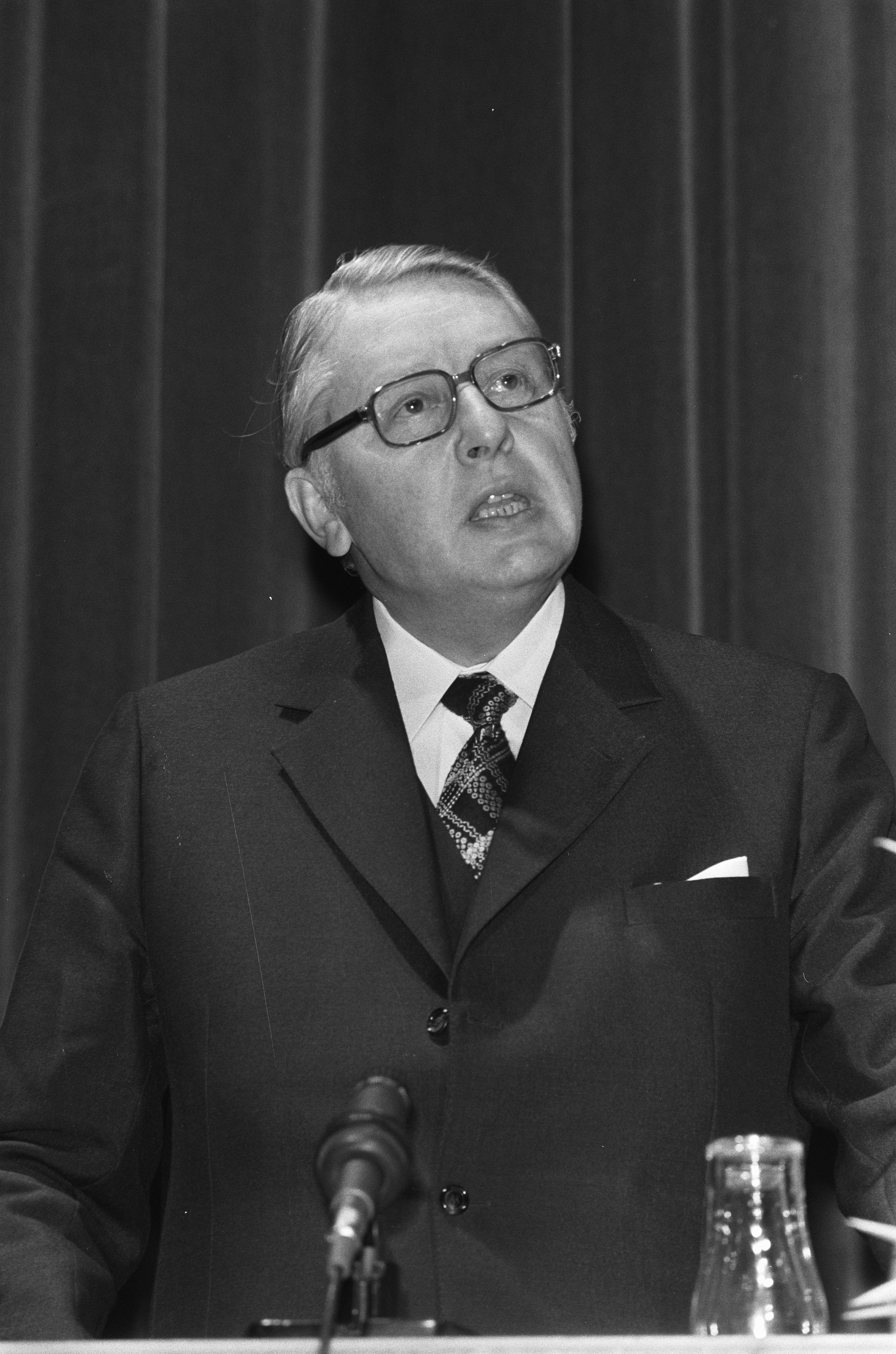 Collectie / Archief : Fotocollectie Anefo Reportage / Serie : De beurs Europort 73 wordt geopend in de RAI Beschrijving : De Duitse minister van verkeer Lauritzen spreekt tijdens de opening Datum : 13 november 1973 Locatie : Amsterdam, Noord-Holland Trefwoorden : beurzen, draglines, ministers, openingen Persoonsnaam : Lauritzen, L. Fotograaf : Hans Peters / Anefo Auteursrechthebbende : Nationaal Archief Materiaalsoort : Negatief (zwart/wit) Nummer archiefinventaris : bekijk toegang 2.24.01.05 Bestanddeelnummer : 926-8231